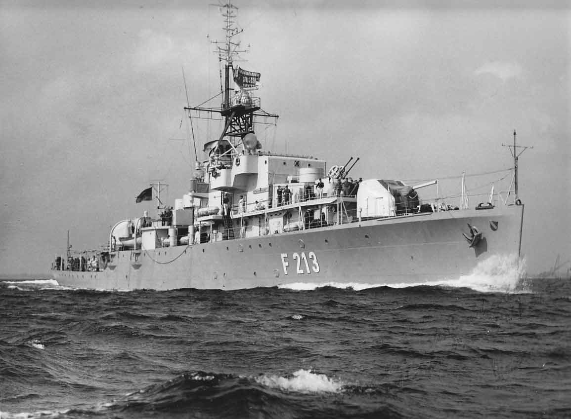 Die deutsche Schulfregatte Scharnhorst (F313)